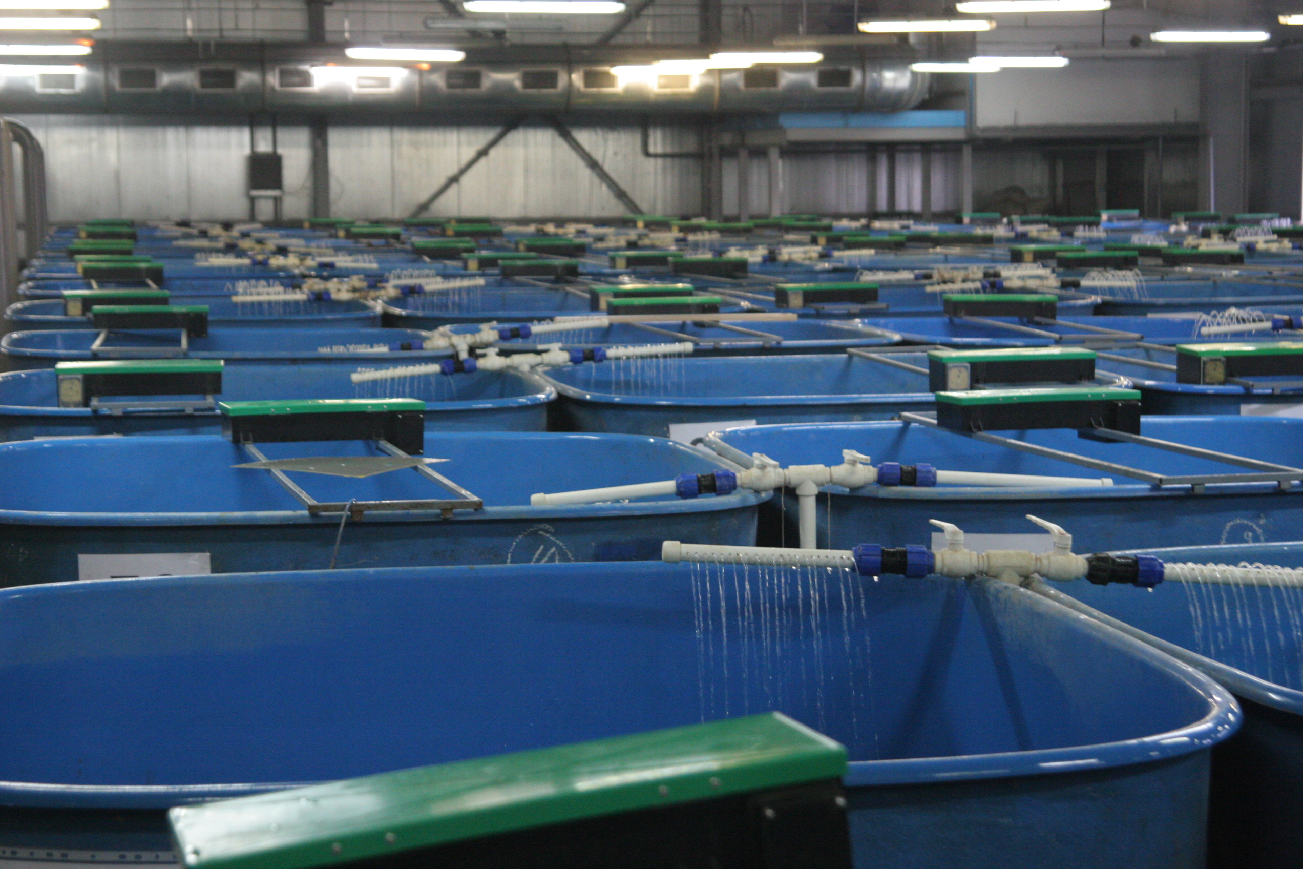 Астрахань, апрель 2011